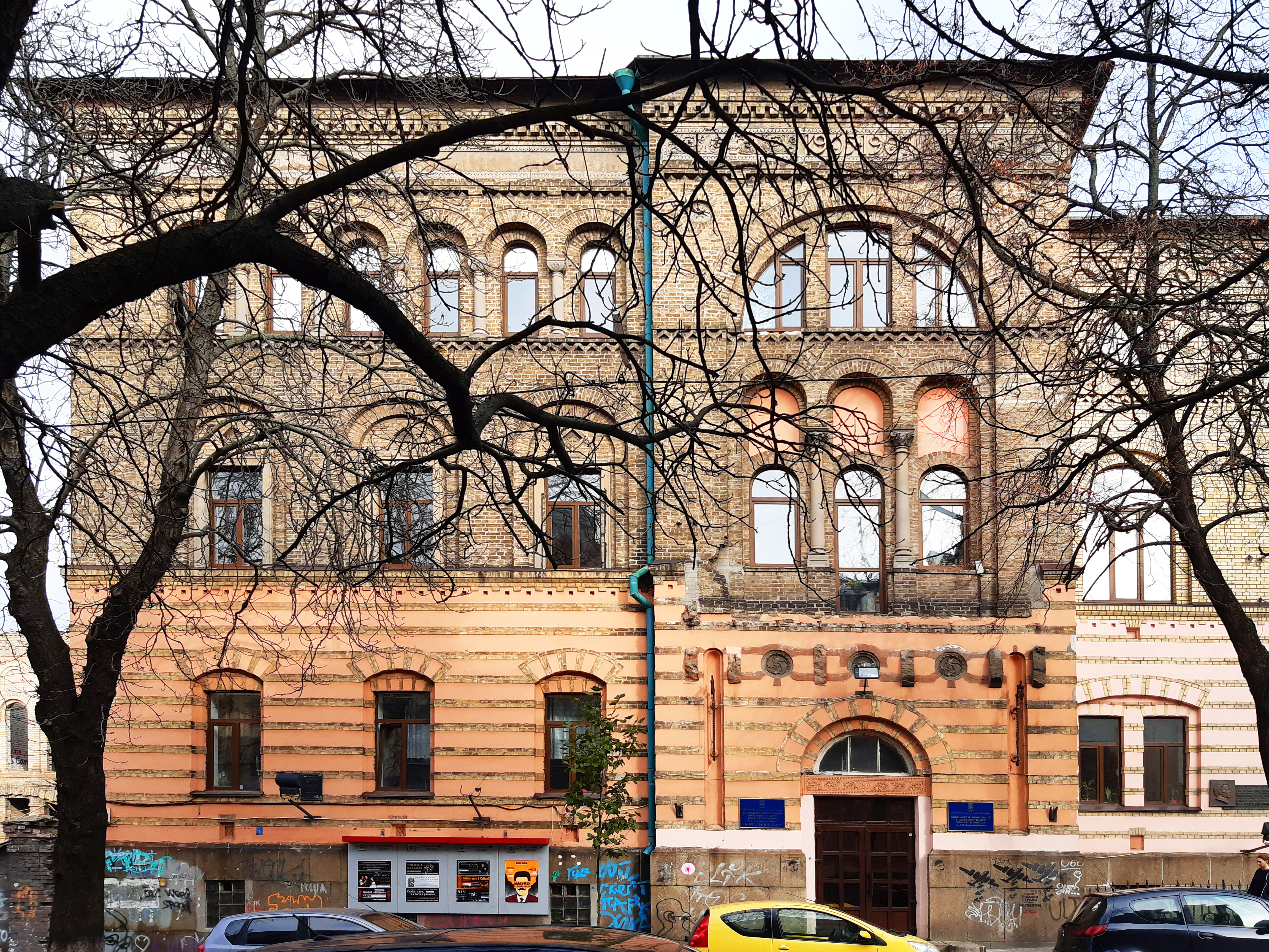 Будинок колишнього Міського парафіяльного училища імені Терещенка, Київ, вул. Ярославів Вал, 40